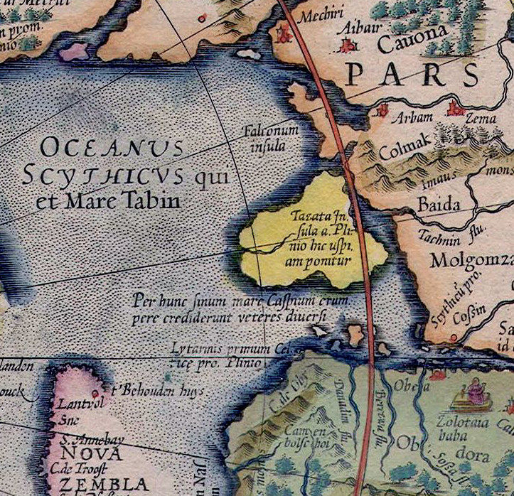 L'isola leggendaria di Tazata nella carta dell'Artico di Mercatore (1623)